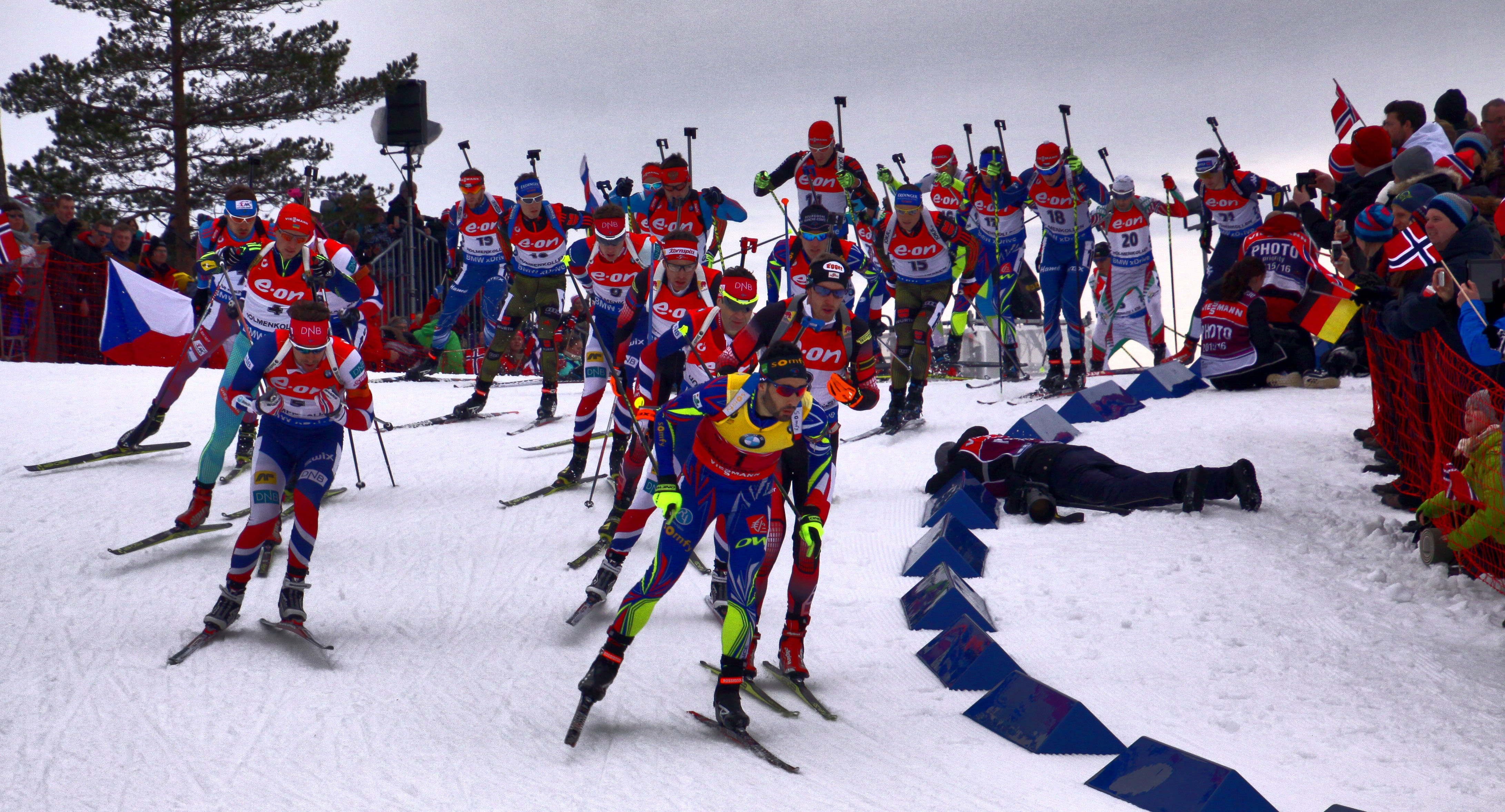 Oslo. Aux championnats du monde de biathlon.